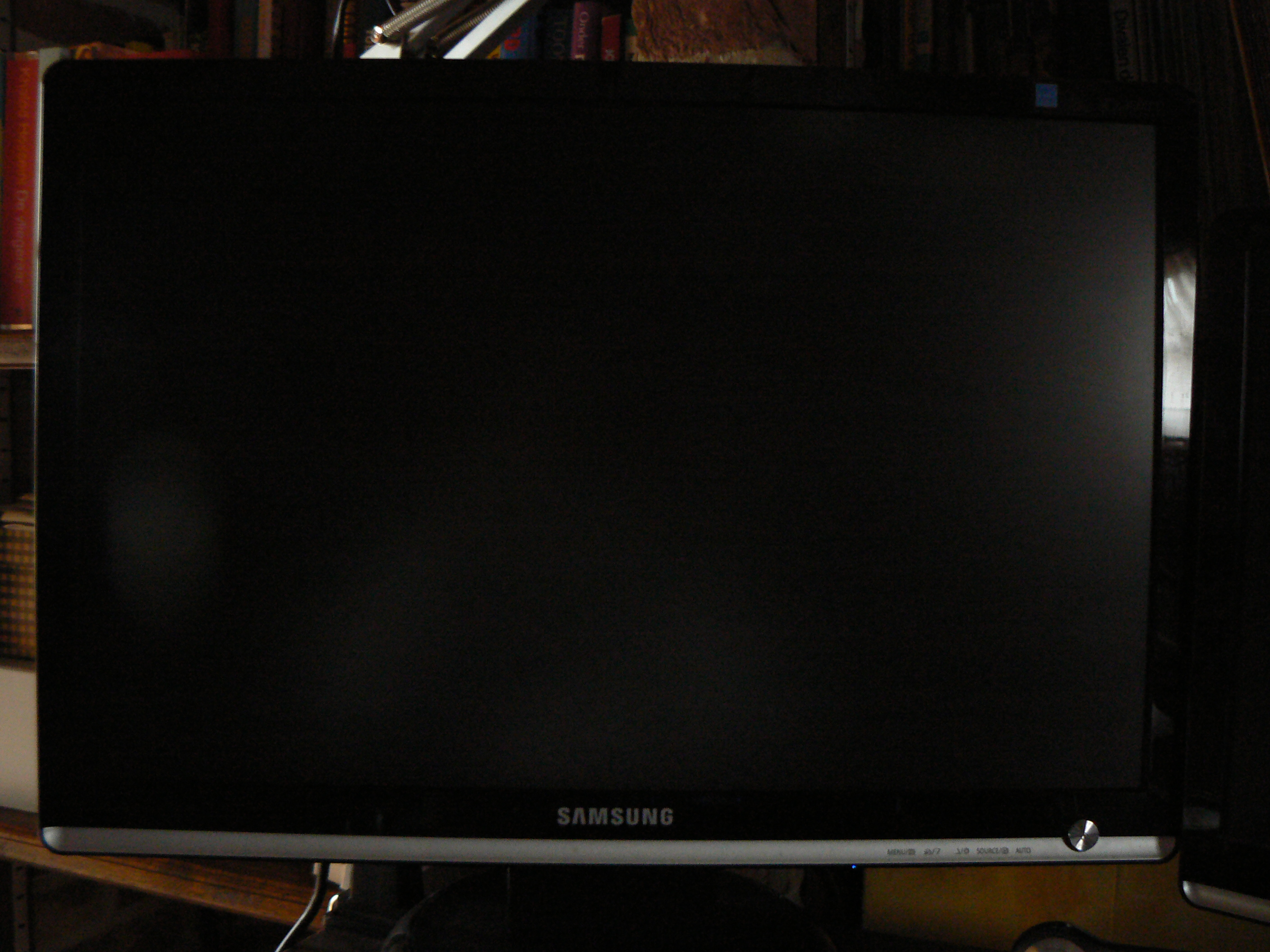 Computer monitor